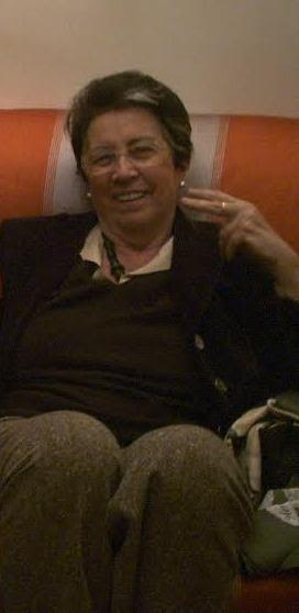 La storia dell'arte e scrittrice Marisa Volpi, Roma